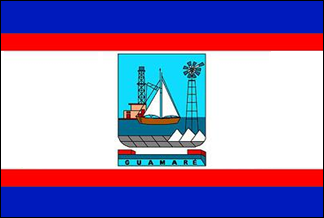 Bandeira de Guamaré, Rio Grande do Norte, Brasil.